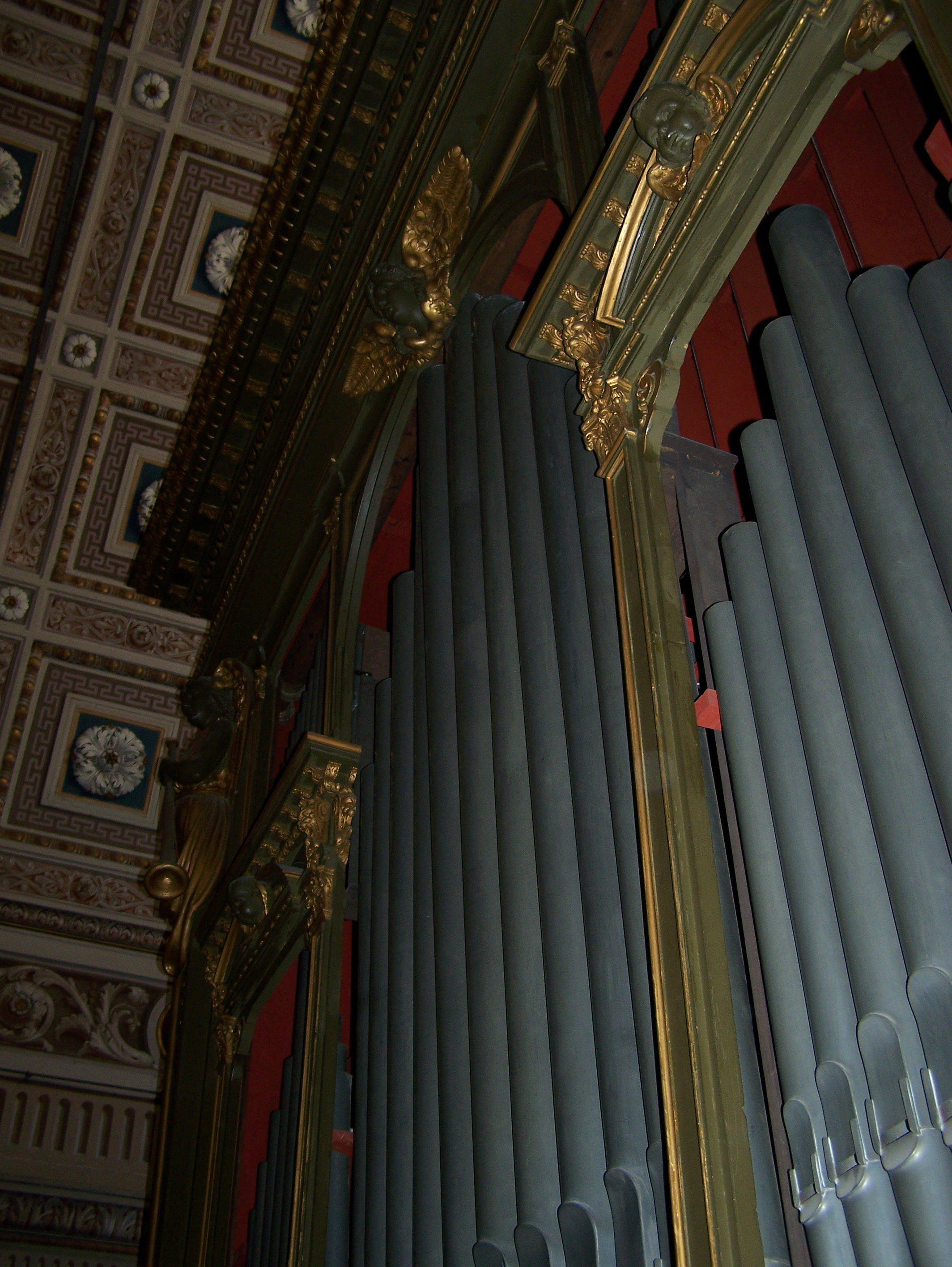 Organo della Chiesa di San Vittore, Corbetta